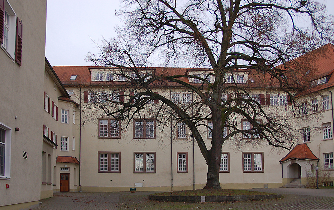 Schlosshof Markgröningen (Blick auf Westflügel), heute Helene-Lange-Gymnasium. Die Sommerlinde ist ein Naturdenkmal.